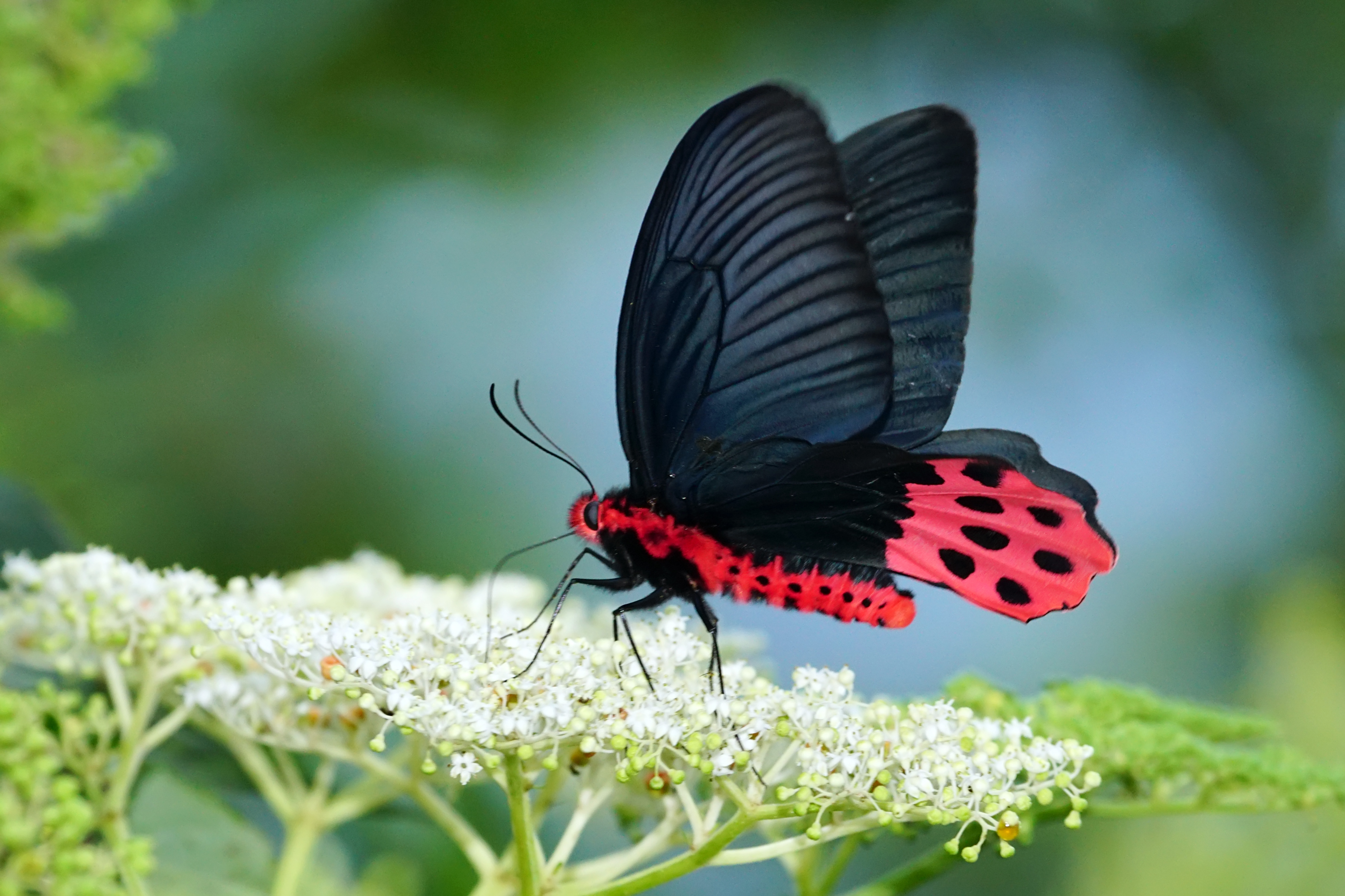 曙鳳蝶 Atrophaneura horishana 雄